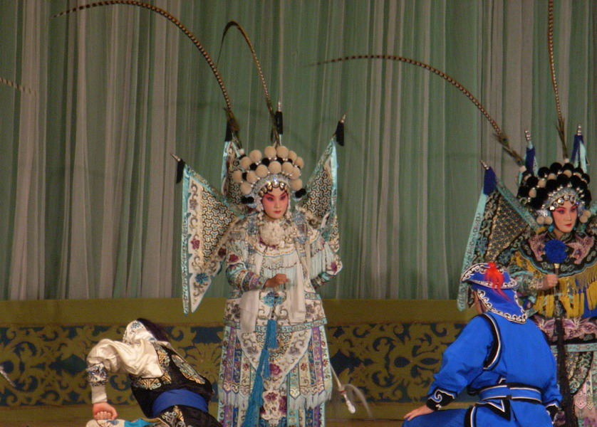 《探谷破敌》中的穆桂英